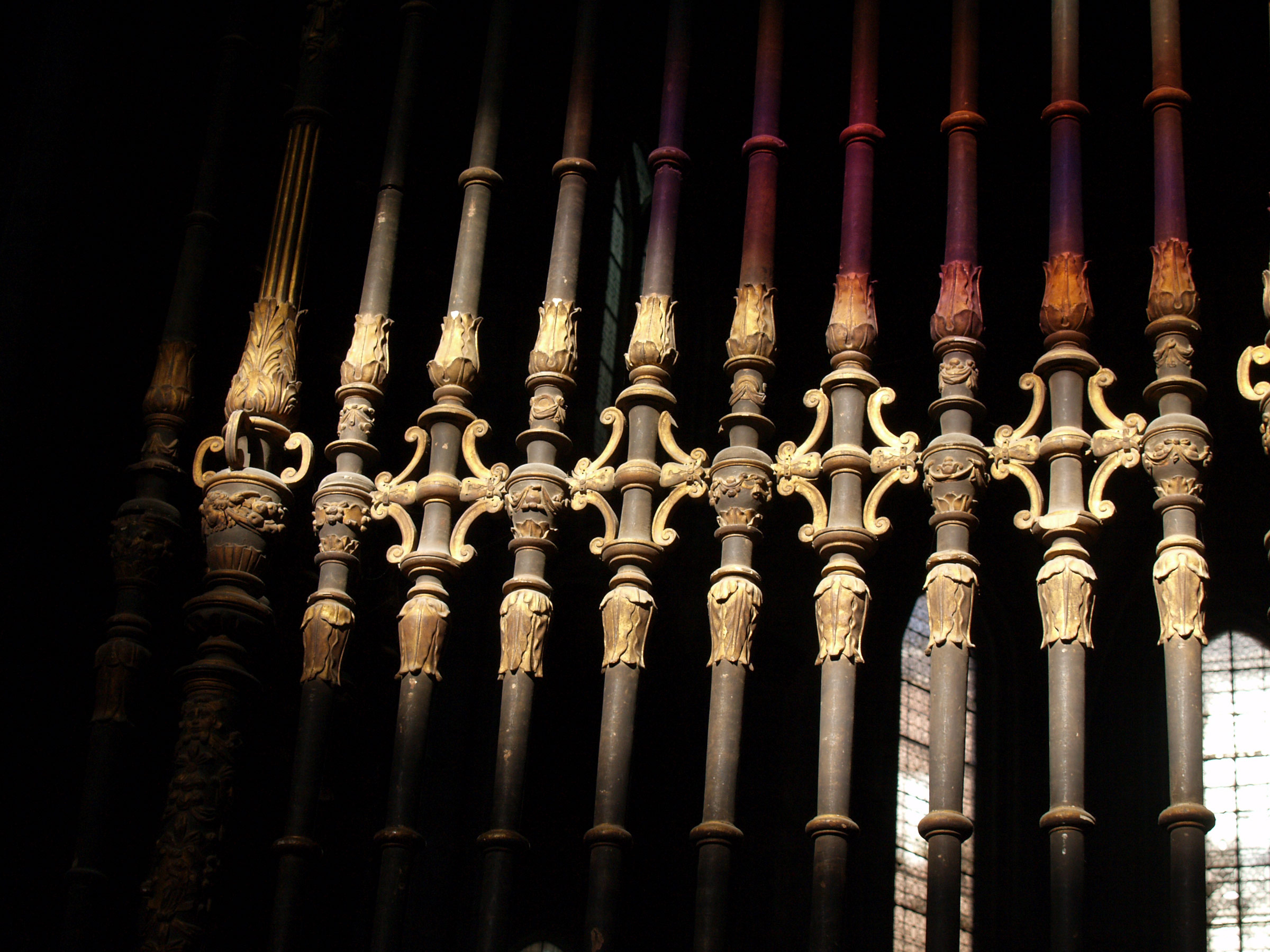 Reja de la iglesia del monasterio de San Benito el Real (Valladolid, España)